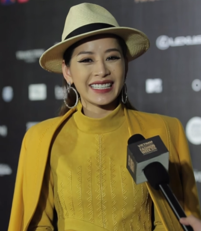 Chi Pu, ảnh chụp màn hình từ video của Vietnam International Fashion Week (screen capture from video of Vietnam International Fashion Week). CHI PU KÍN CỔNG CAO TƯỜNG ĐỌ SẮC CÙNG DÀN HOA HẬU VÁY ÁO RỰC RỠ TRÊN THẢM ĐỎ VIFW THU ĐÔNG 2016